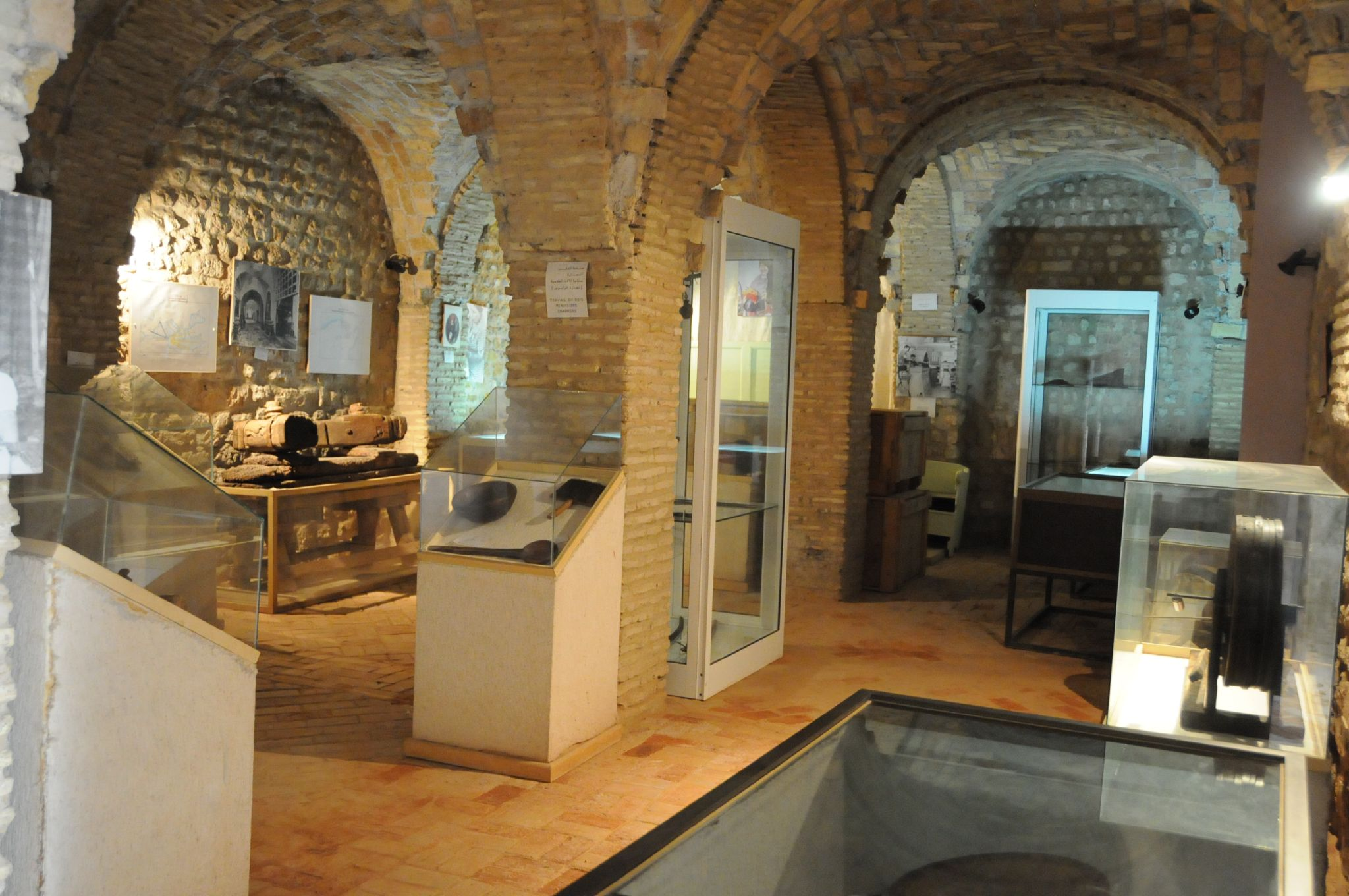 Le musée des arts traditionnelles Dar Ben Abdallah, Tunis, Tunisie